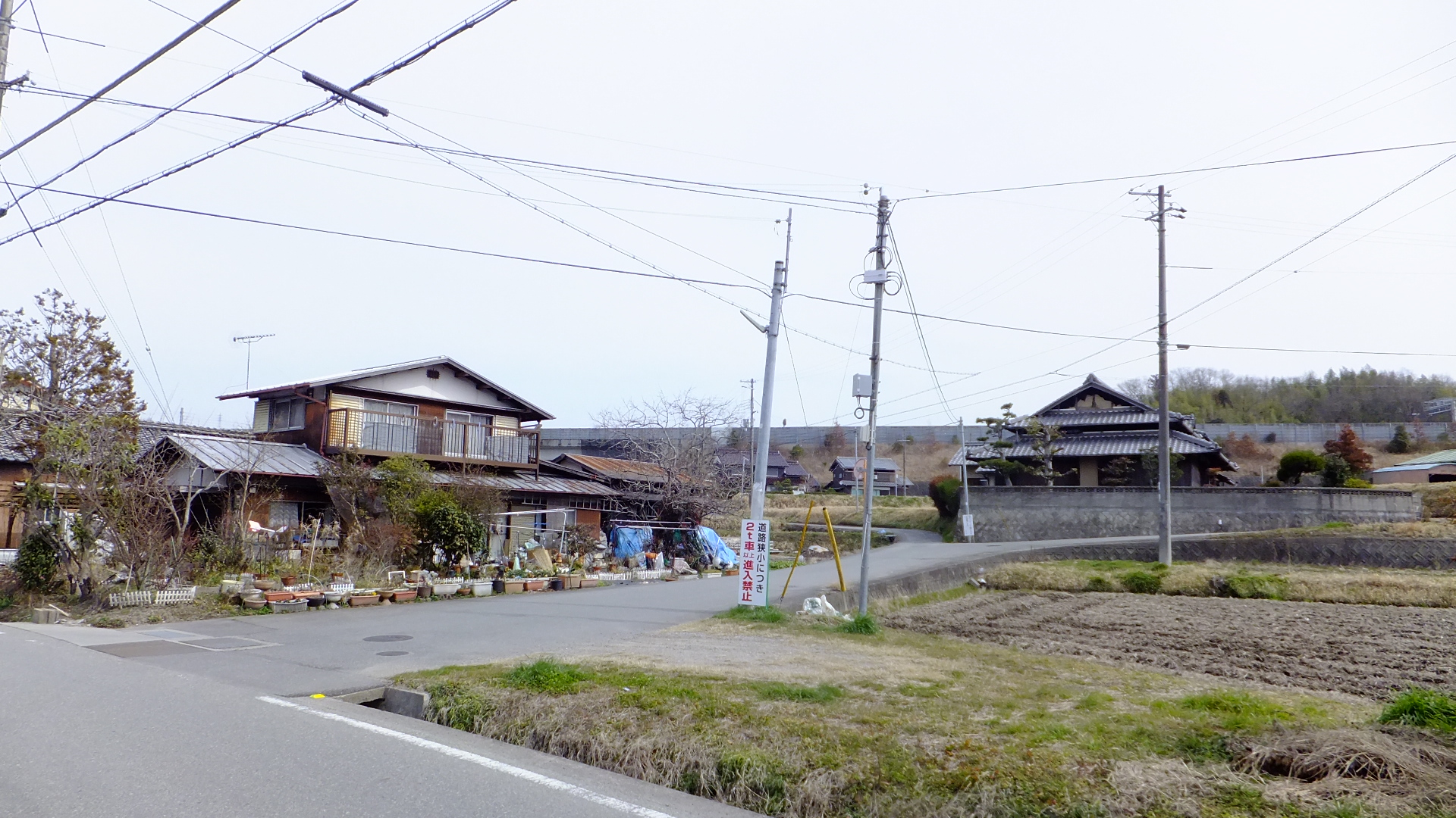 兵庫県三木市吉川町古市